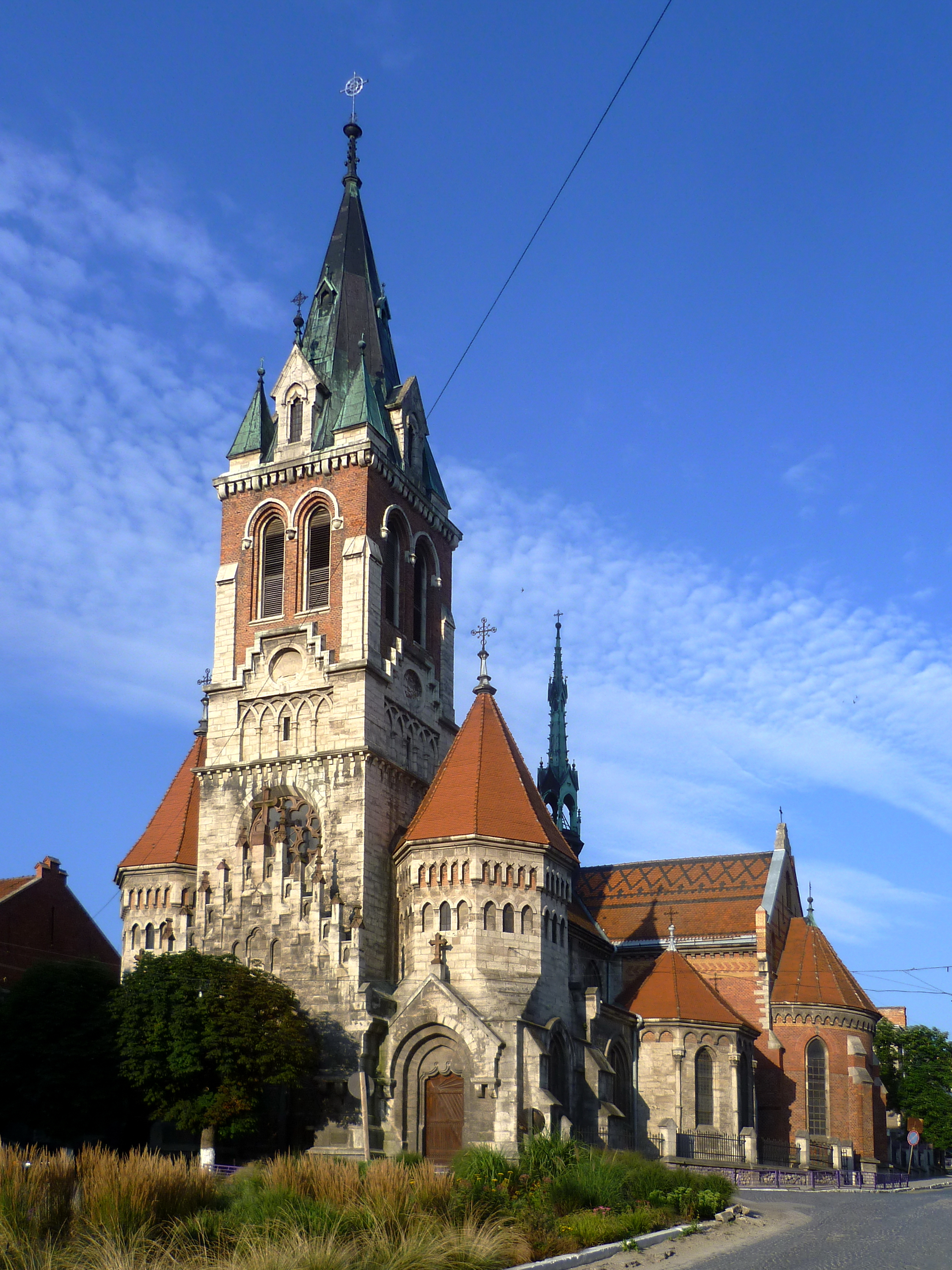 Костел Св.Станіслава (мур.) (1619-1909 роки) - м.Чортків (вул.Шевченка, 2) Тернопільська область Україна